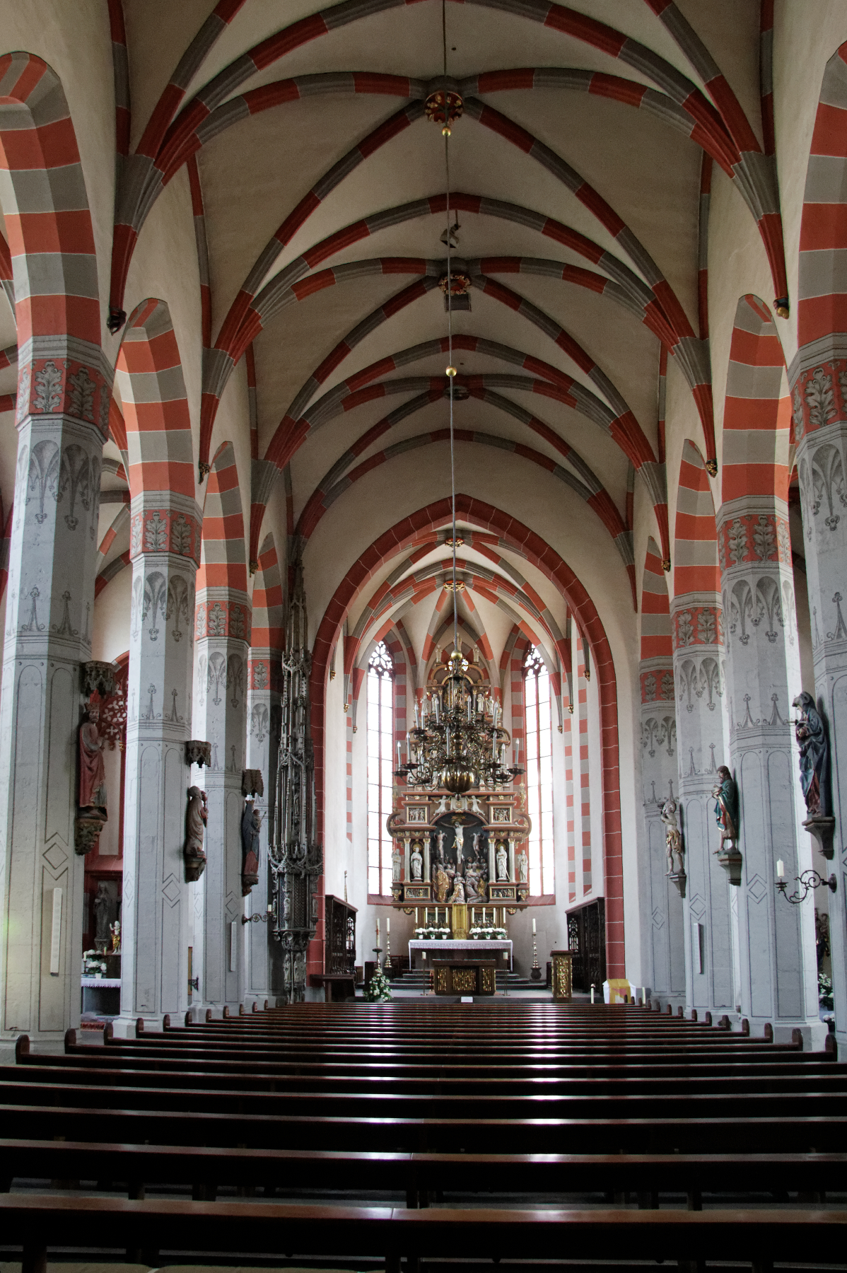 Ochsenfurt, St. Andreas, Hauptschiff nach vorne gesehen